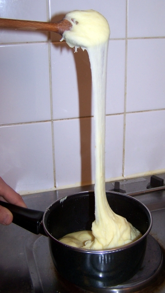 Préparation de l'aligot (cuisine française)